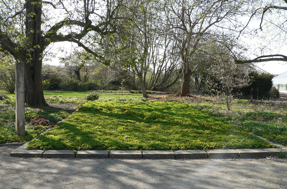 Gartenbauanstalt Grundmauern Laubhütte